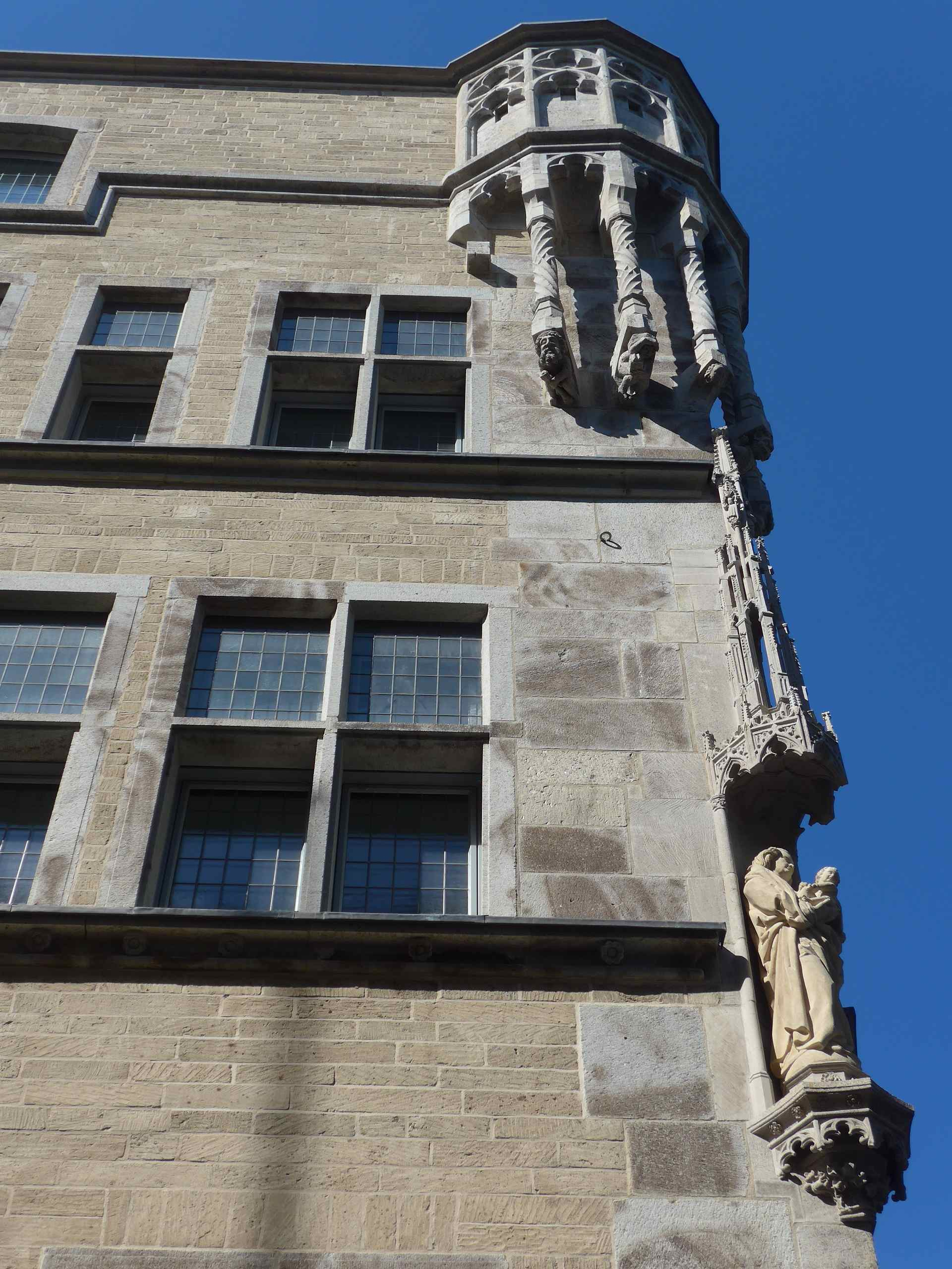 Haus Saaleck, Am Hof 50, Spätgotische Stilelemente Eckwärter und Kreuzstockfenster This is a photograph of an architectural monument.